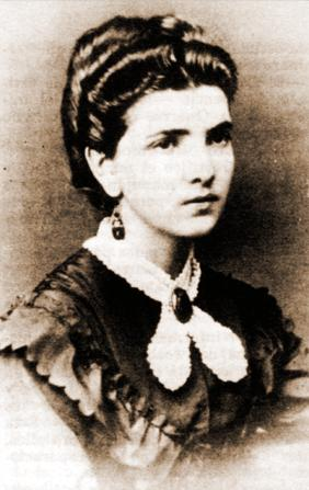 Carmela Carvajal Briones (1851 - 1931)